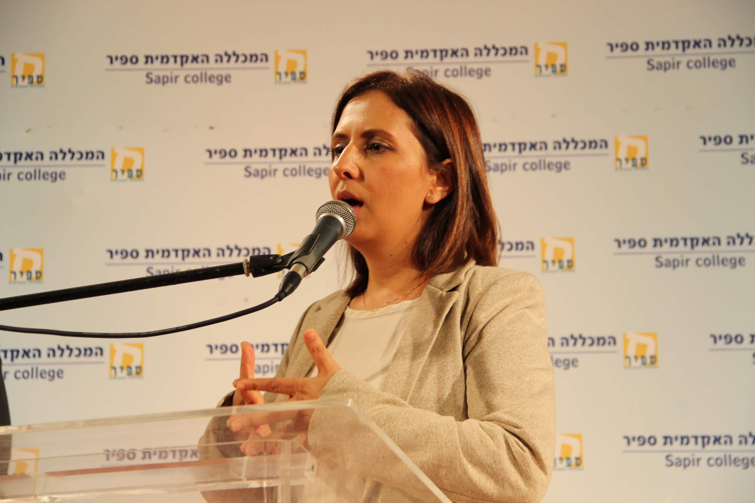 כנס שדרות לחברה במכללה האקדמית ספיר ובעיר שדרות 2015